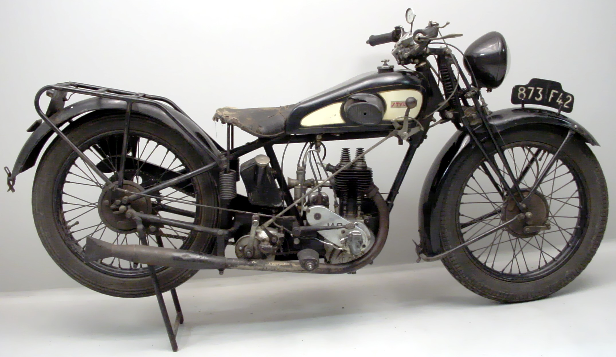 Stylson JAP 1930.